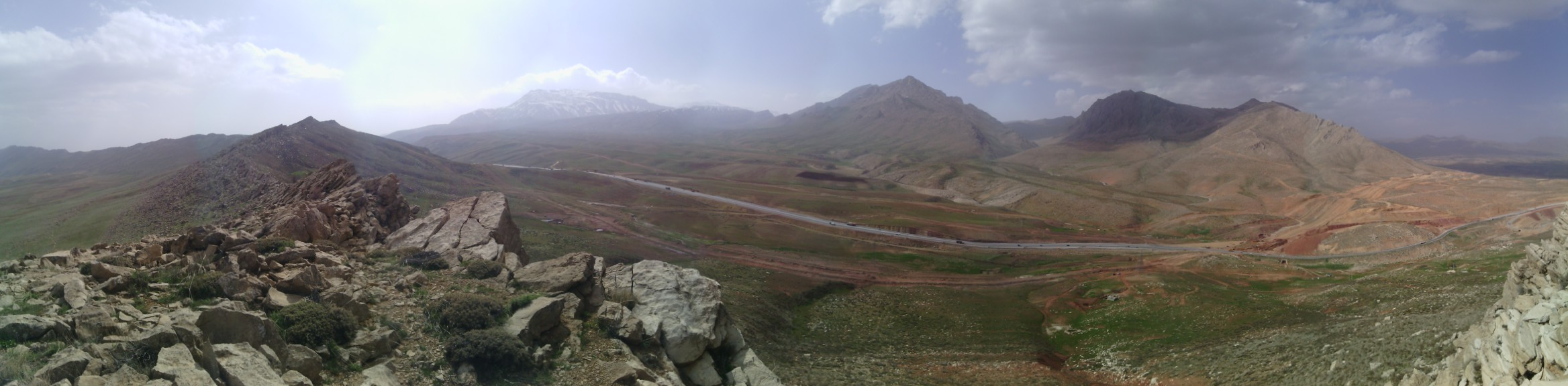 منطقه گورشنگلی در یک نگاه